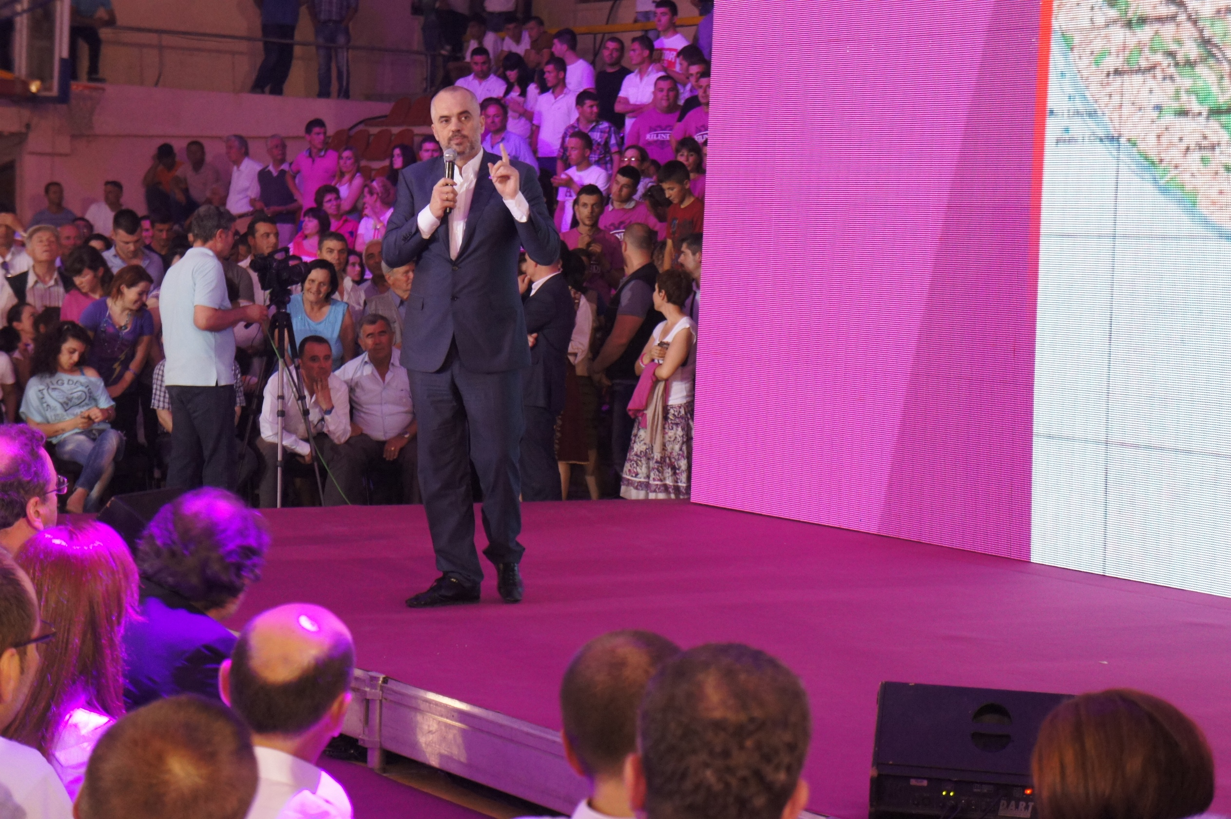 EDI RAMA VLORE